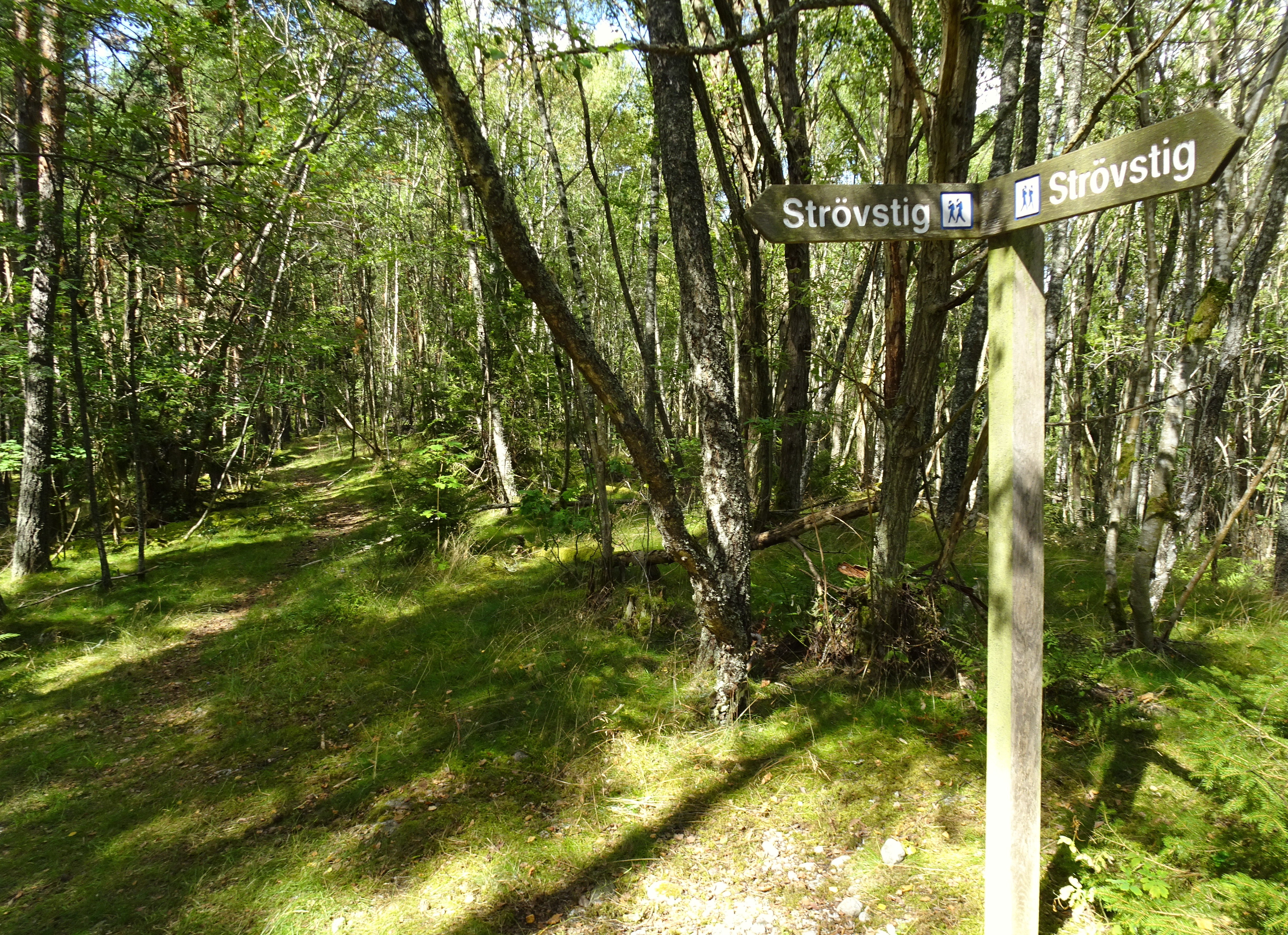 Huvududdens naturreservat vägvisare